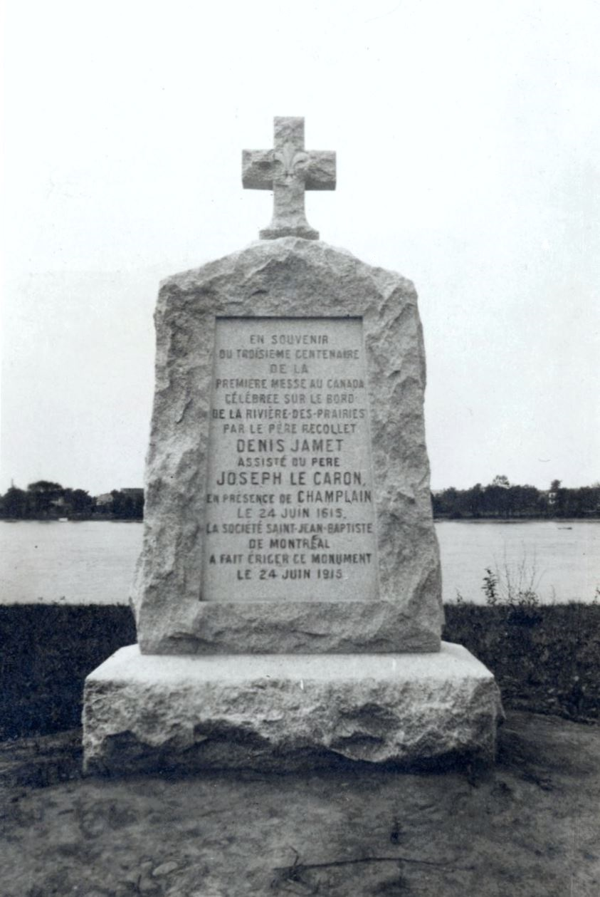 Monument au 3e centenaire de la première messe célébrée sur l'Île de Montréal, monument situé au parc Nicolas-Viel, arrondissement Ahuntsic-Cartierville, Montréal, Québec. Texte : « En souvenir du troisième centenaire de la première messe au Canada célébrée sur le bord de la rivière des Prairies par le père récollet Denis Jamet assisté du père Joseph Le Caron, en présence de Champlain le 24 juin 1615. La Société Saint-Jean-Baptiste de Montréal a fait ériger ce monument le 24 juin 1915. »